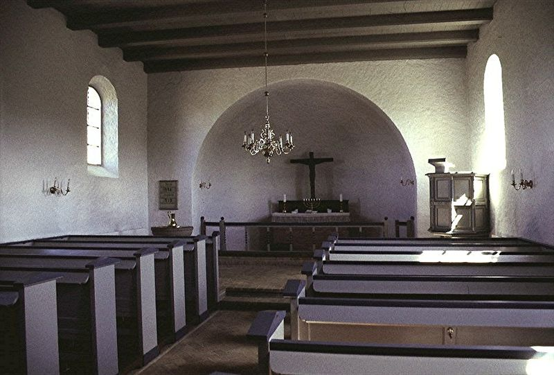 Vittrup Kirke i Danmark. Skibet set mod øst